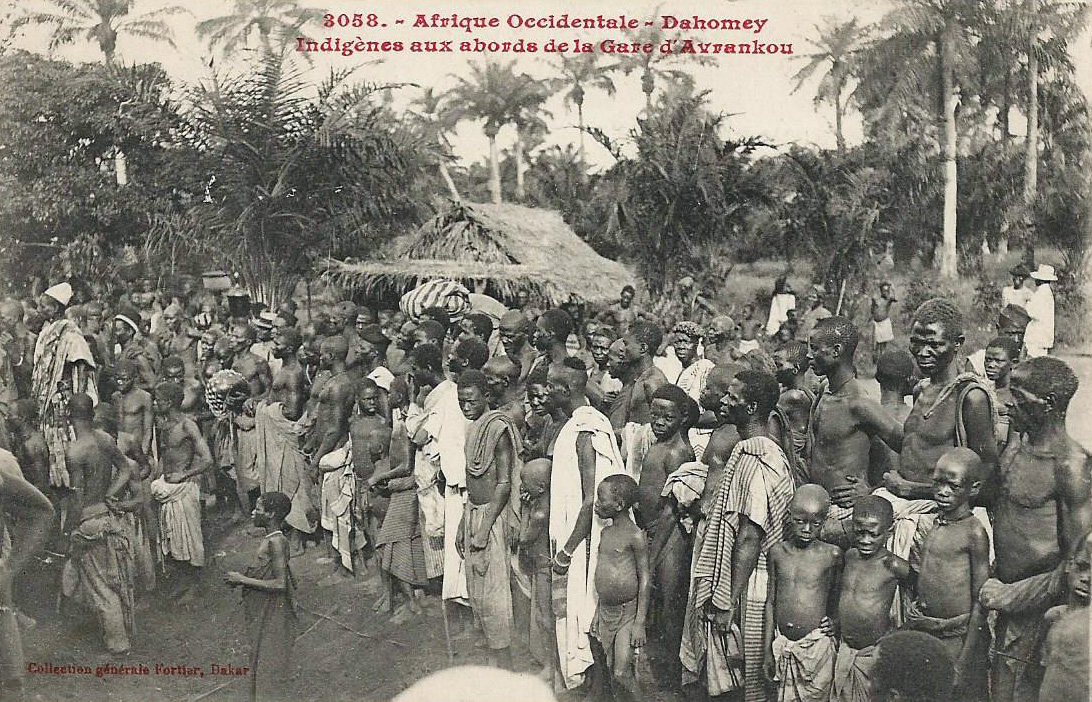 François-Edmond Fortier, Dahomey. Indigènes aux abord de la gare d'Avrankou. Afrique Occidentale. Dahomey